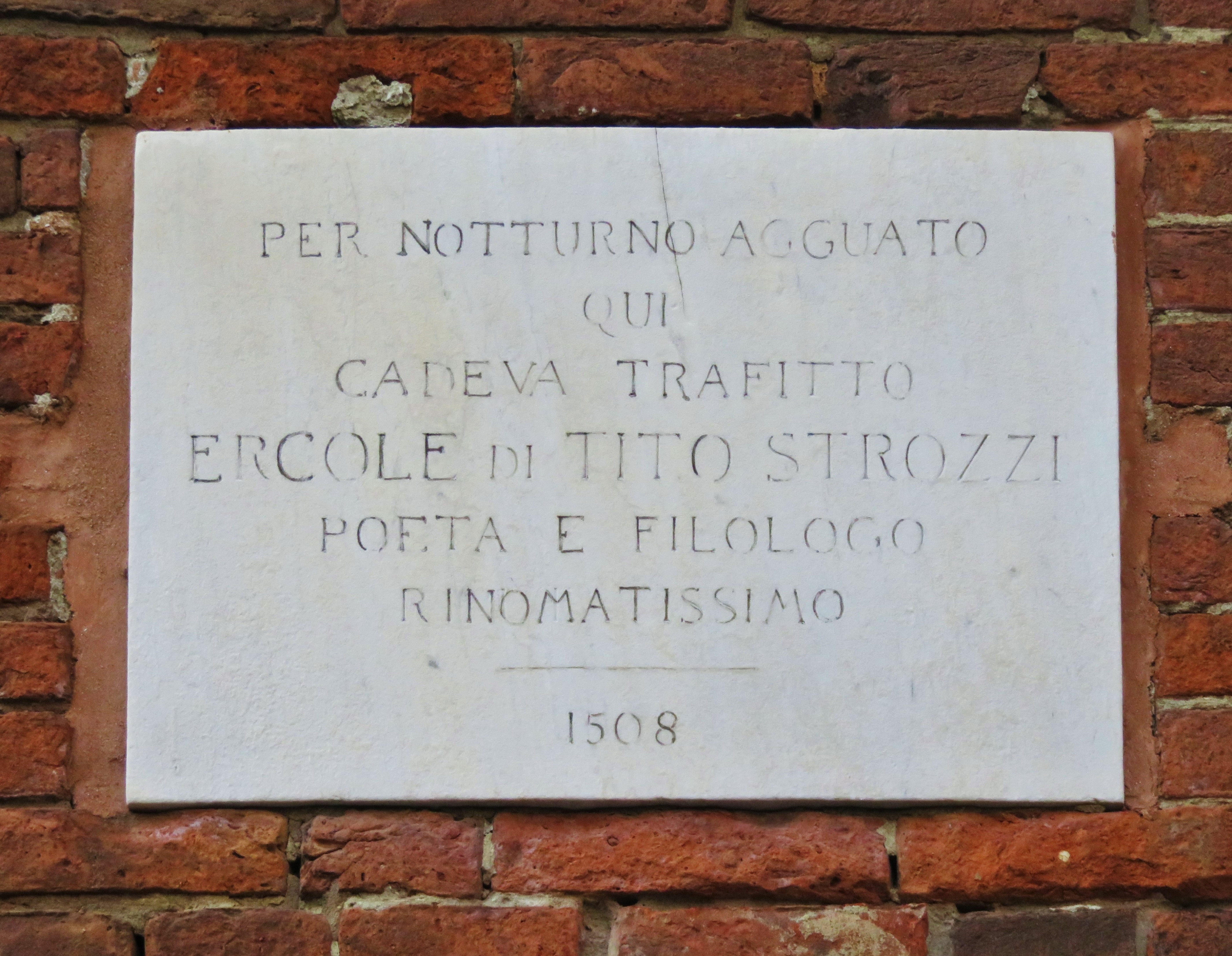 Angolo tra via Savonarola e via Praisolo, edificio di Casa Romei. Epigrafe marmorea che ricorda l'uccisione di Ercole Strozzi